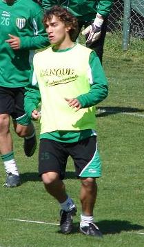 Sebastián Fernandez